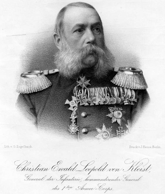 Christian Ewald Leopold von Kleist (1824–1910), Lithographie von Georg Engelbach